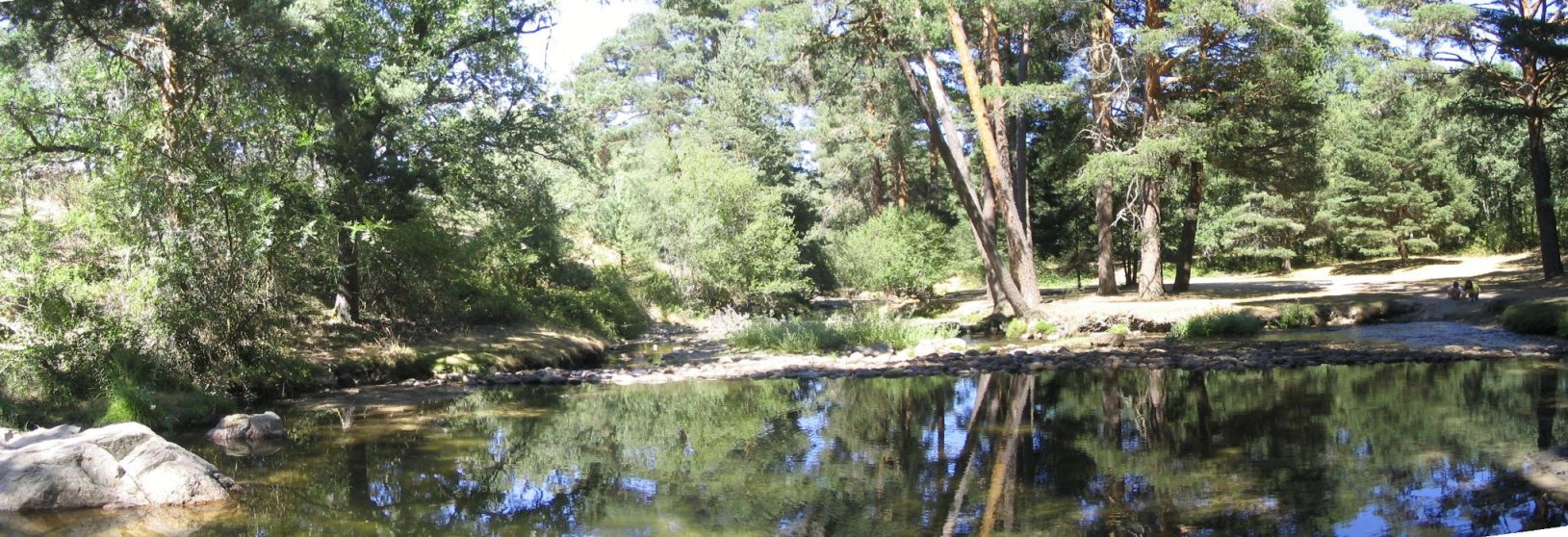 Pequeña presa situada en el río Eresma, a la altura del valle de Valsaín (Sierra de Guadarrama), España.